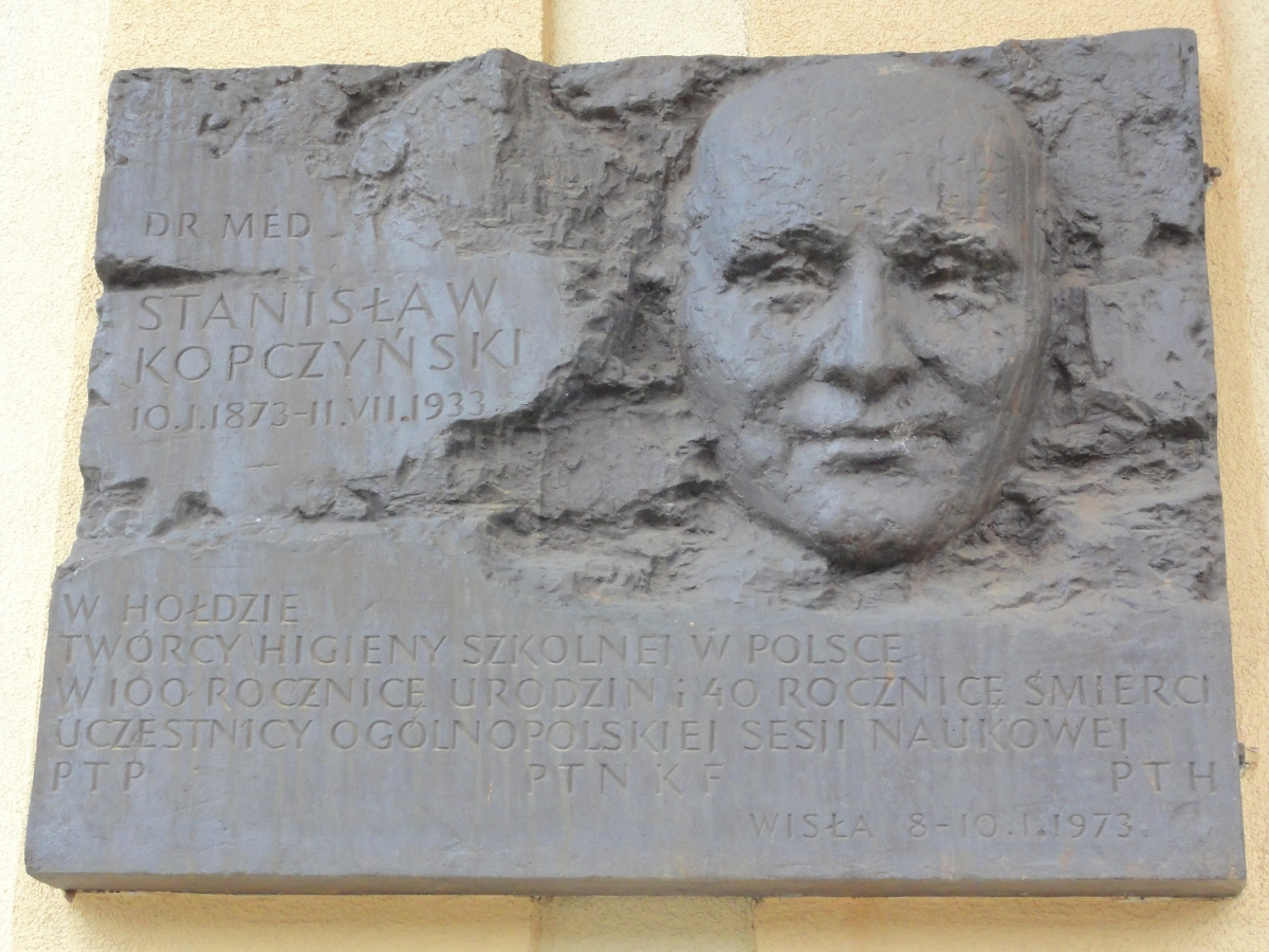 Tabliczka Stanisława Kopczyńskiego na budynku Zespołu Szkół nr 1 w Wiśle